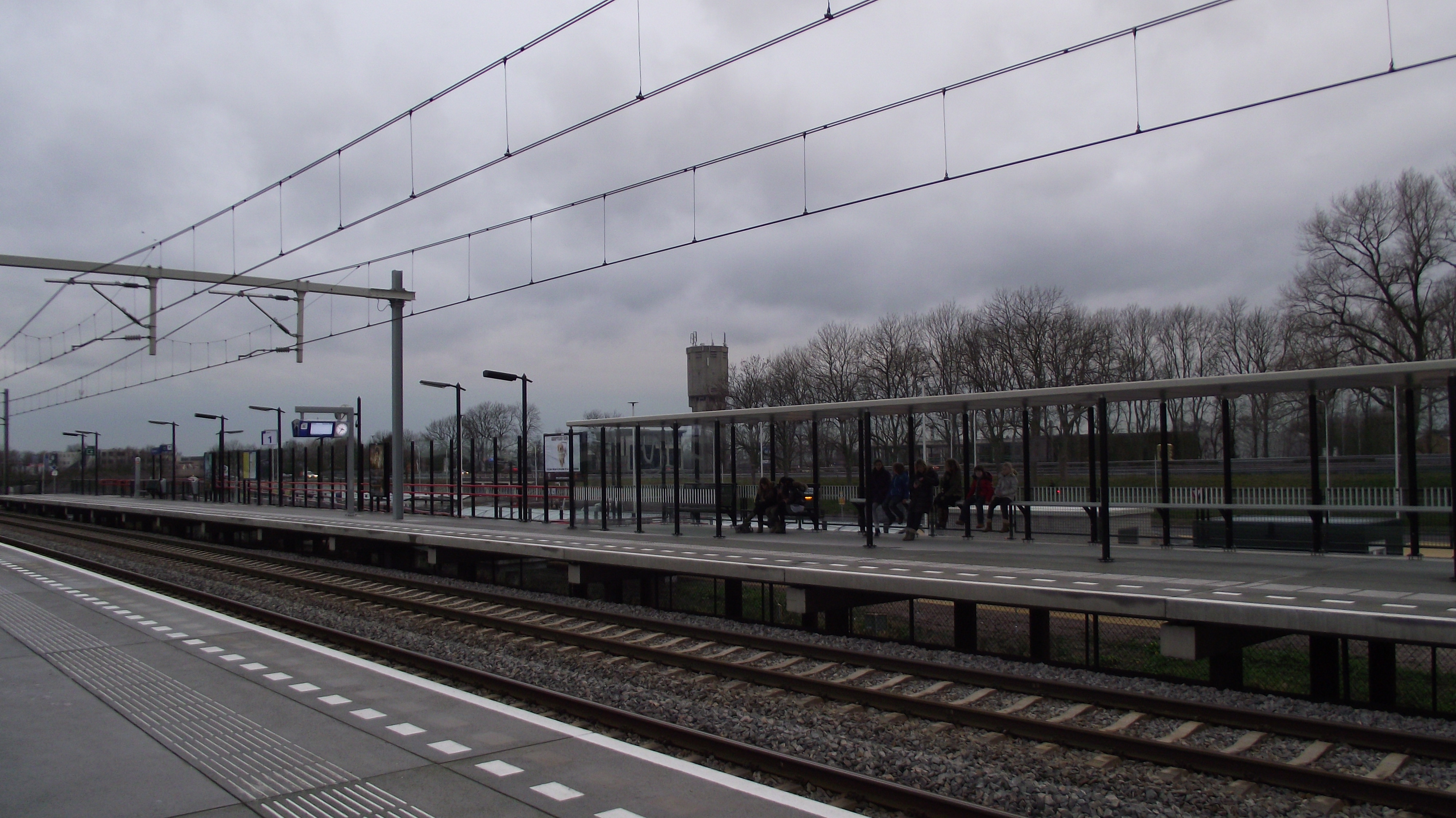 Nieuw station Sassenheim geopend in december 2011